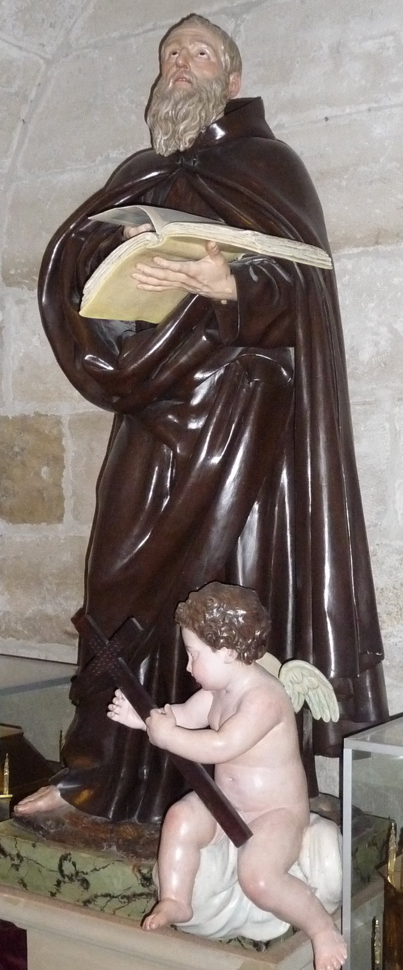 Iglesia de Santo Tomás. Haro, La Rioja (España) - Imagen de San Felices de Esteban de Ágreda. Comienzos del siglo XIX.